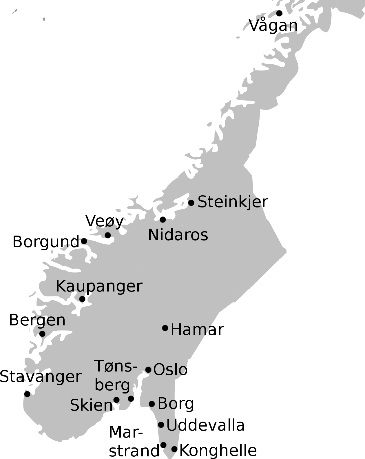 Tettsentre i Norge som er omtalt med bytermer i middelalderkilder. Kilde: Helle, Knut; Eliassen, Finn-Einar; Myhre, Jan Eivind og Stugu, Ola Svein (2006) Norsk byhistorie : urbanisering gjennom 1300 år – Pax, Oslo. ISBN 978-82-530-2882-8.